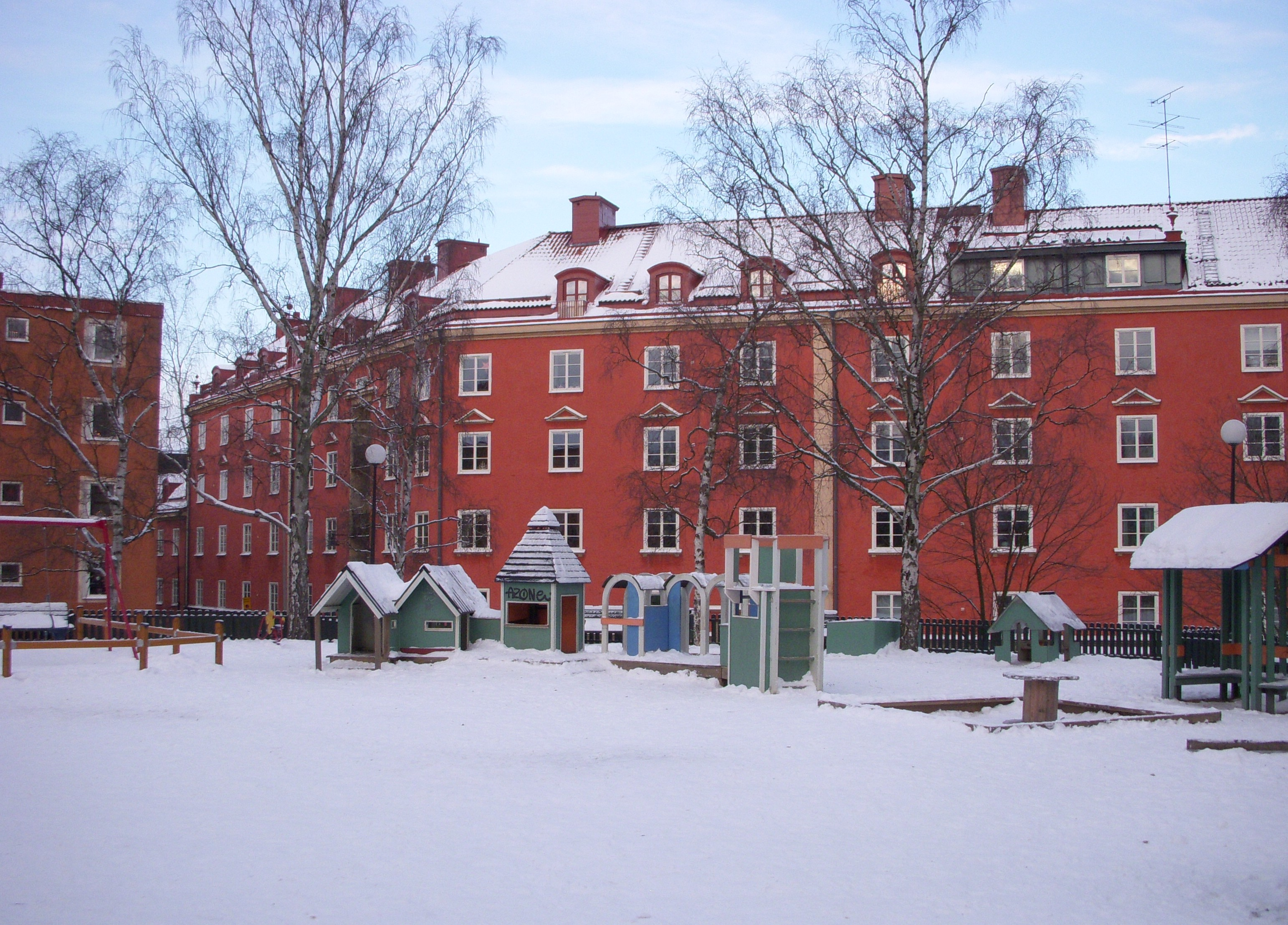 "Röda bergen" i Vasastan i Stockholm